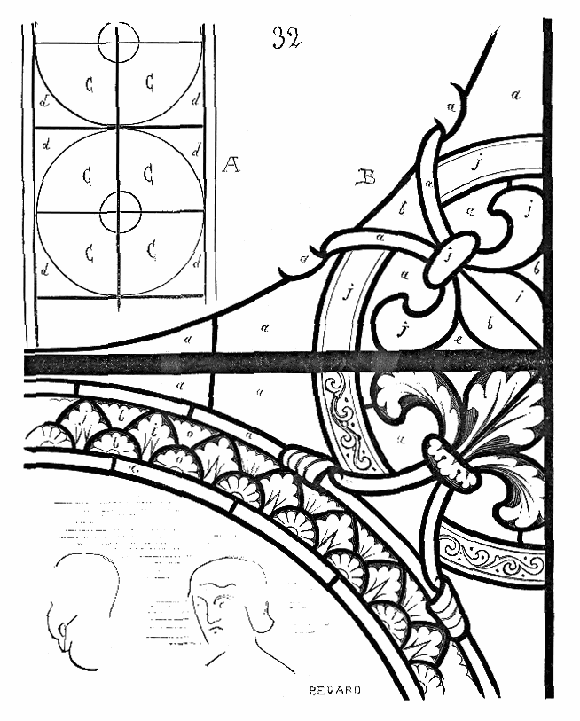 ... Ces vitraux appartiennent à la cathédrale de Châlons, qui, bien que datant en presque totalité du XIIIe siècle, conserve d'assez nombreux fragments de vitraux du XIIe siècle, entre autres de fort belles bordures. Nous reproduisons ici le dessin de ces ornements sur fond blanc qui entourent des panneaux à sujets légendaires sur fond bleu. L'ensemble de la verrière donne les compartiments présentés en A (fig. 32). Les sujets sont répartis dans les quarts du cercle C. En B, est tracé un détail des écoinçons d. Nous avons indiqué par des lettres, conformément à la méthode précédemment donnée, les tons des verres dans ce détail: c'est-à-dire que les lettres b, r et j indiquent le bleu, le rouge et le jaune; les lettres a, e, i, o, u, le blanc, le pourpre foncé, le pourpre clair, le vert d'émeraude et le vert bleu turquoise; le jaune du cercle est paille celui j de l'ornement est plus chaud ...